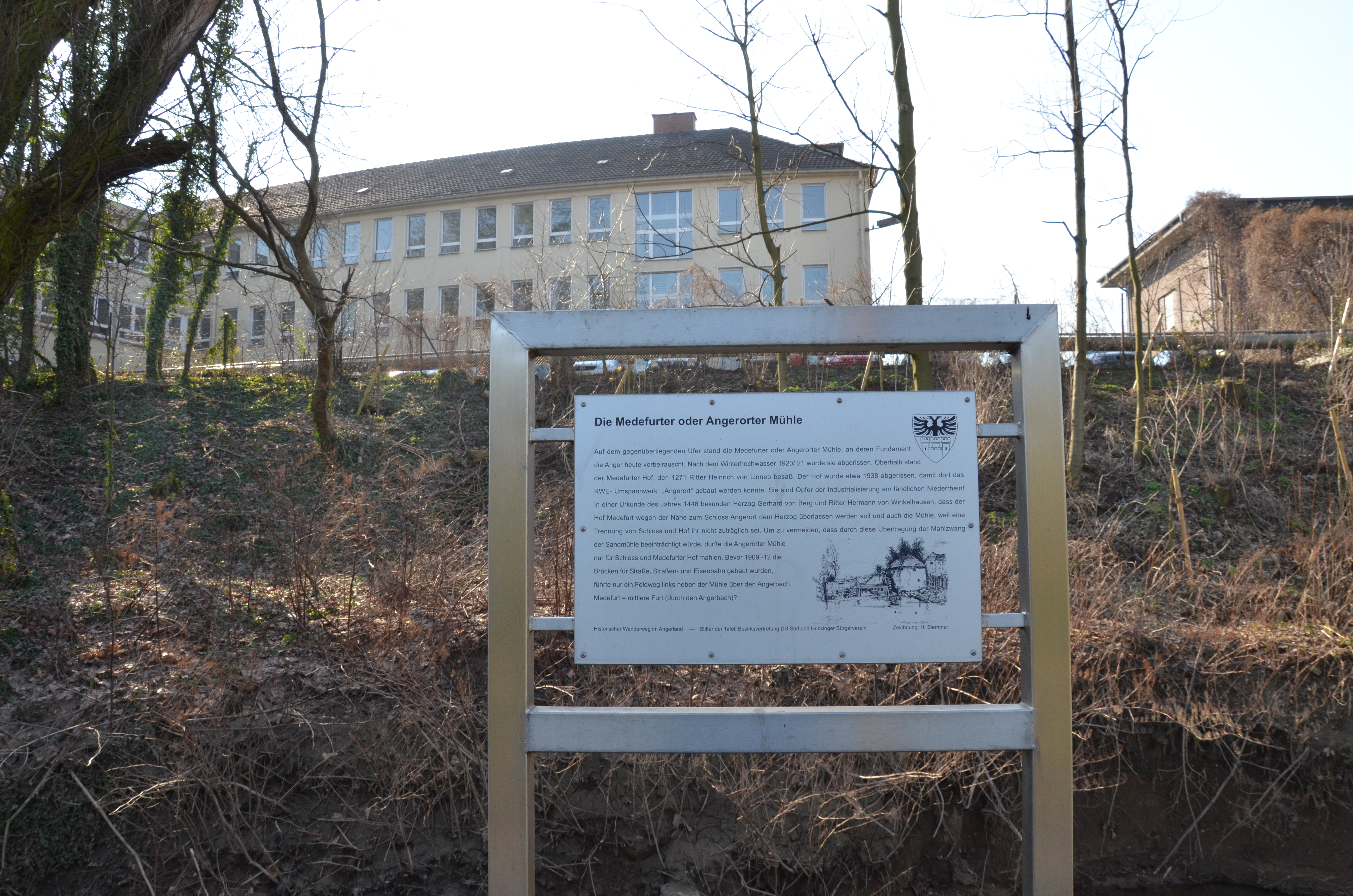 Der Angerbach im Angerpark in Duisburg Angerhausen auf dem letzten Stück zum Angerort an der Mündung in den Rhein Medefurter oder Angerorter Mühle